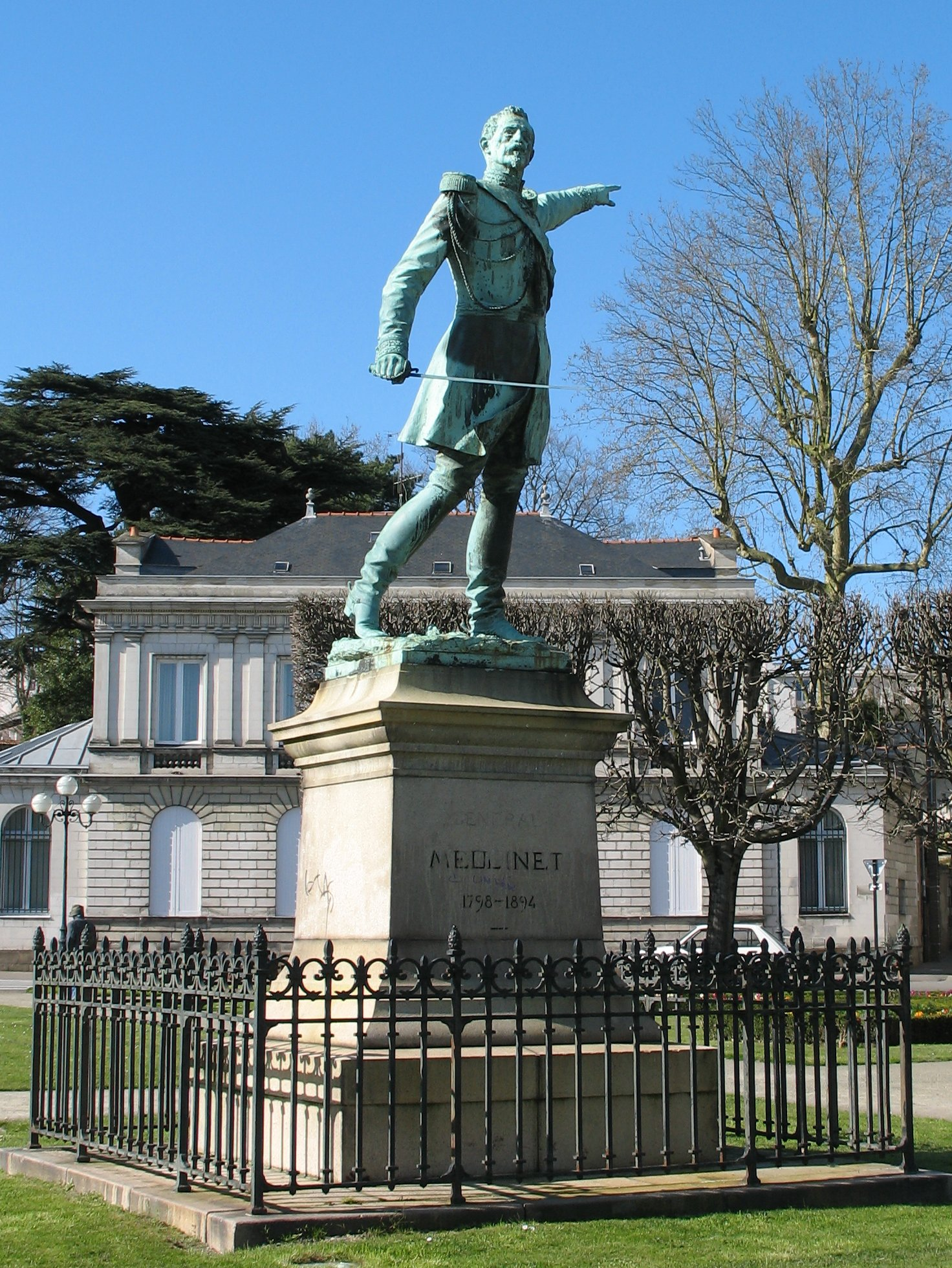 Laurent Marqueste, Monument au genéral Mellinet, 1898, Nantes.